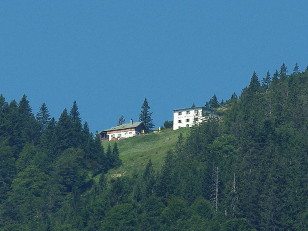 Bruckthal 13, 83435 Bad Reichenhall, Bergunterkunft "Kaiser-Wilhelms-Haus" bei der ZwieselalmThis is a photograph of an architectural monument.